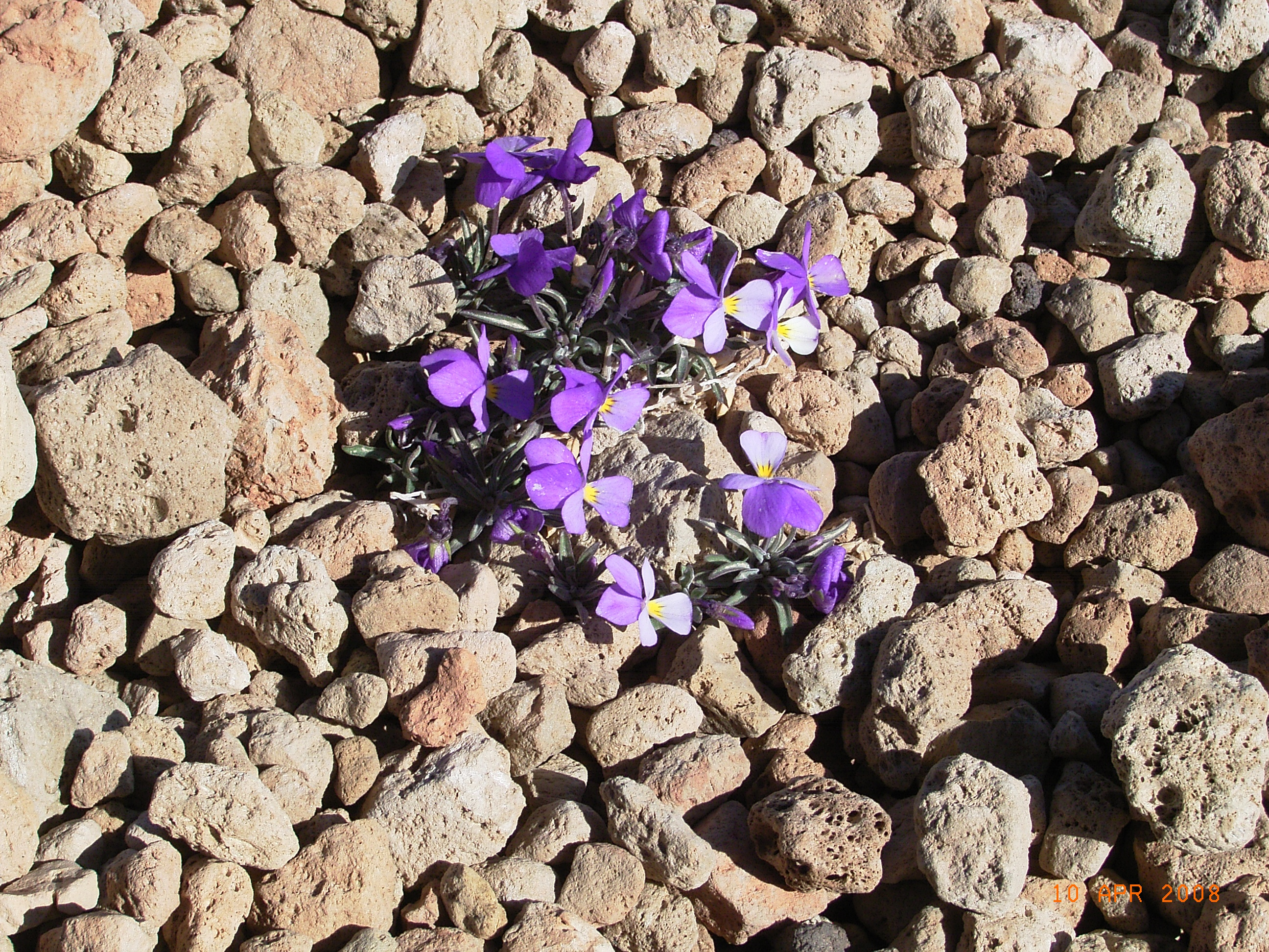 Teide-Violet (Viola_cheiranthifolia)